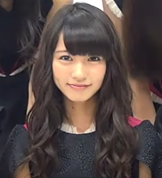 夢みるアドレセンスです。